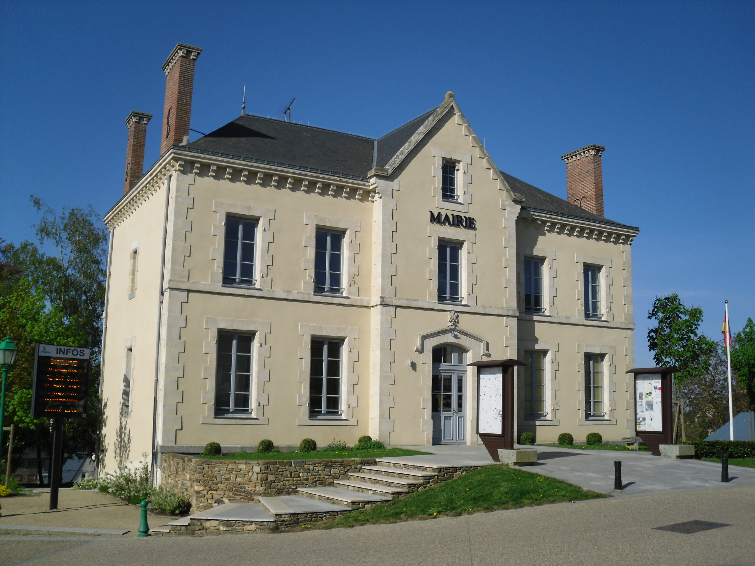 Mairie d'Argentré depuis 2007